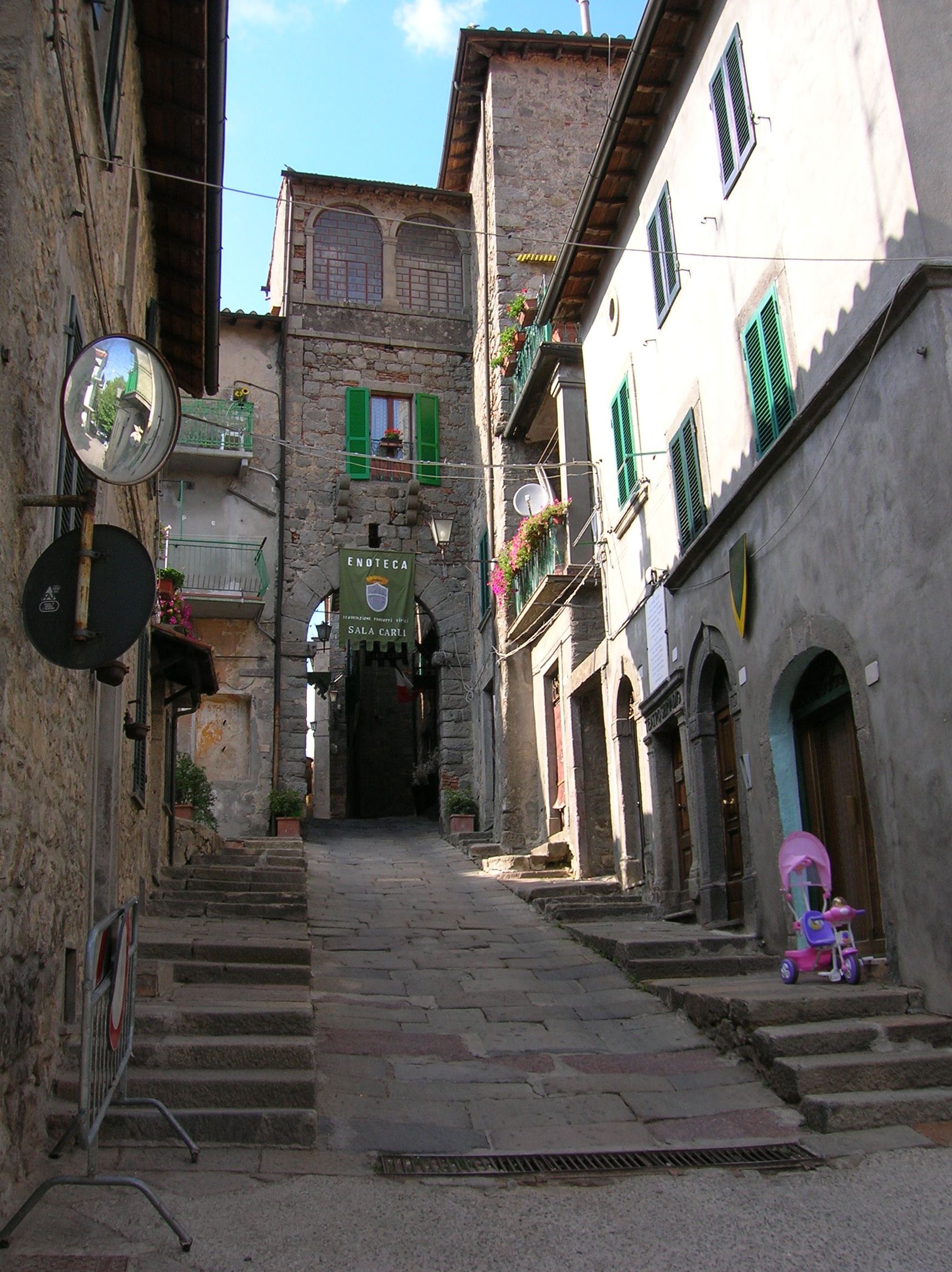 Abbadia San Salvatore, provincia di Siena, Toscana, Italia.